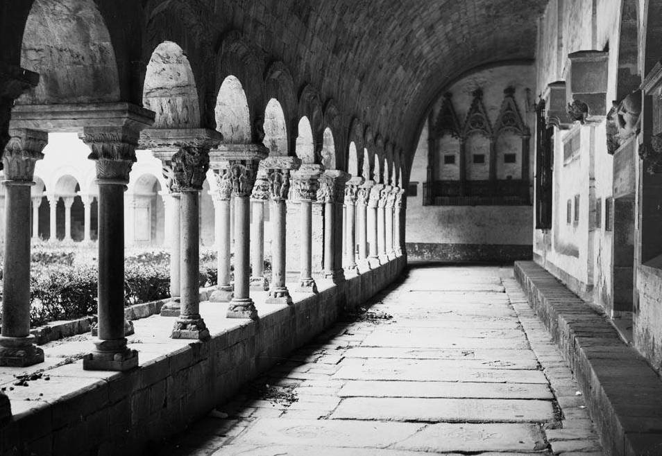 Imatge